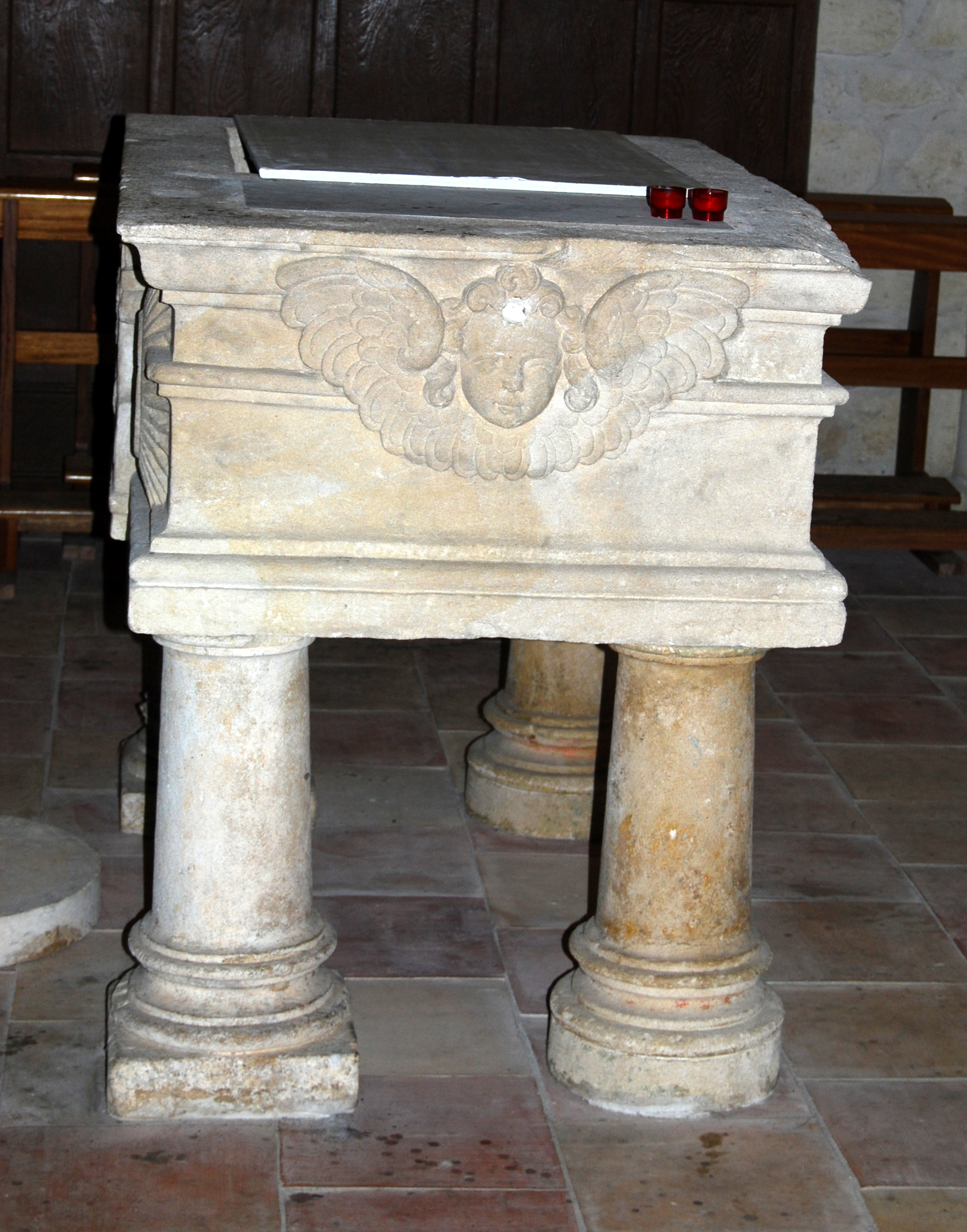 Église Saint-Martin de Carignan-de-Bordeaux